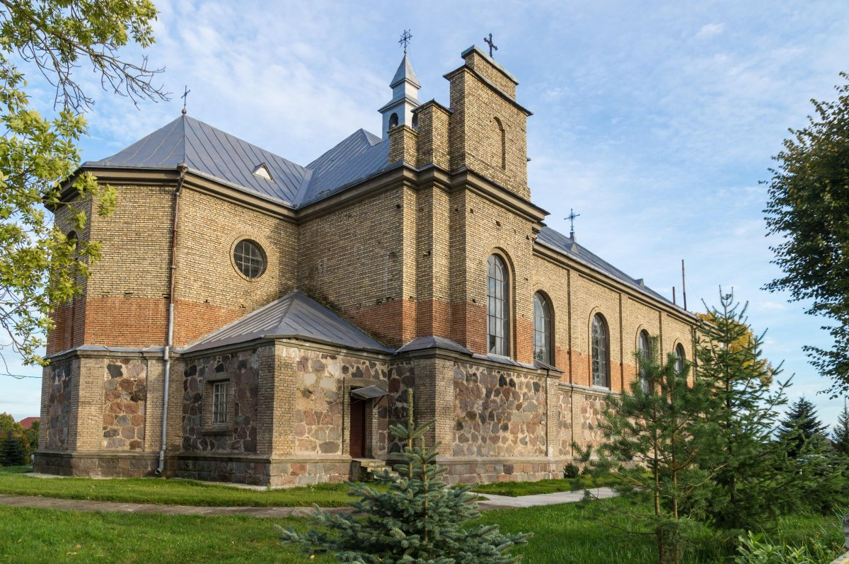 Войстам. Касцёл Найсвяцейшай Тройцы